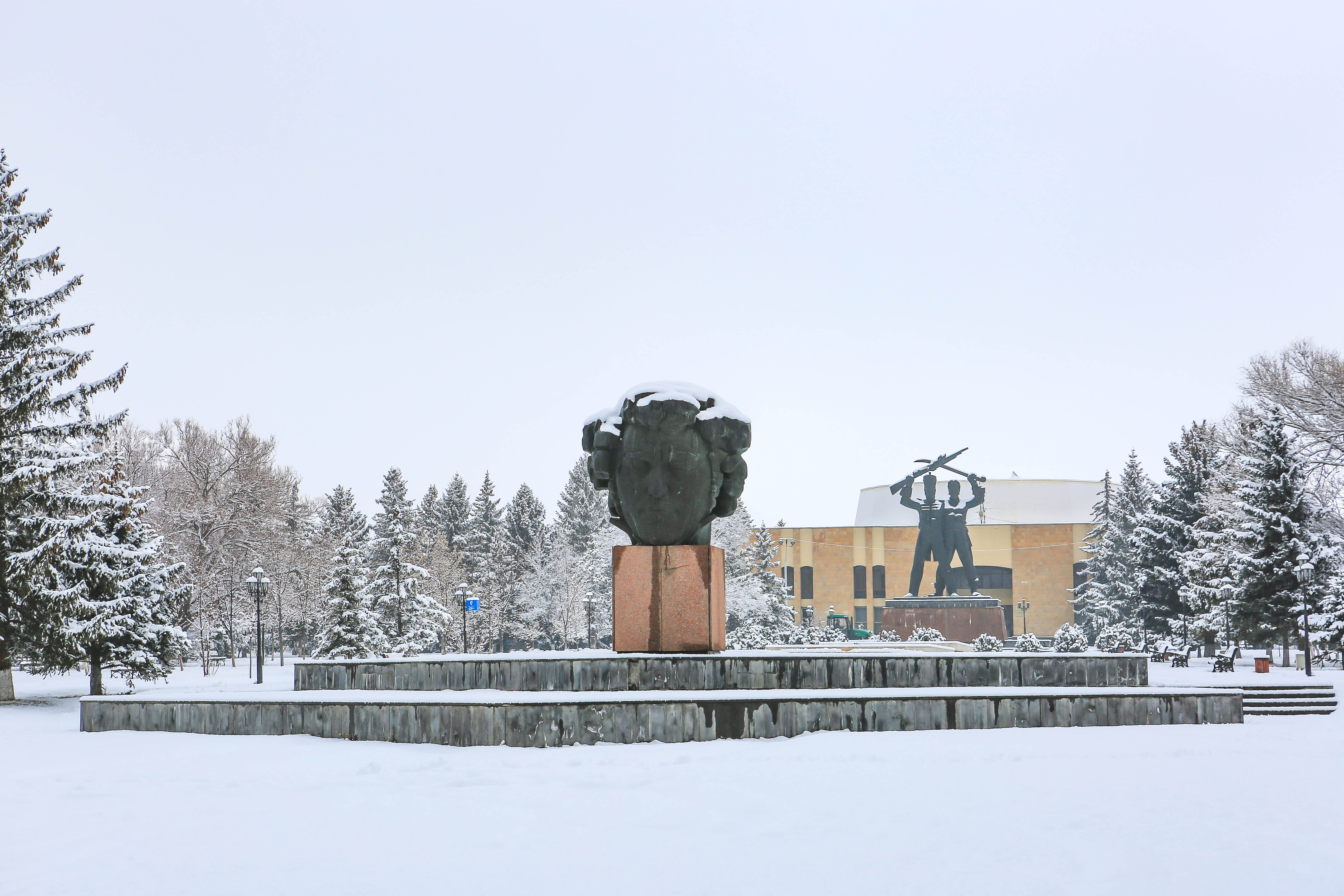 Աբովյանի քաղաքային զբոսայգու մուտքը